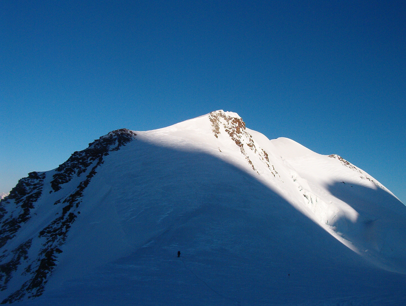 Monte Castore visto dal colle di Felik - Alpi Pennine